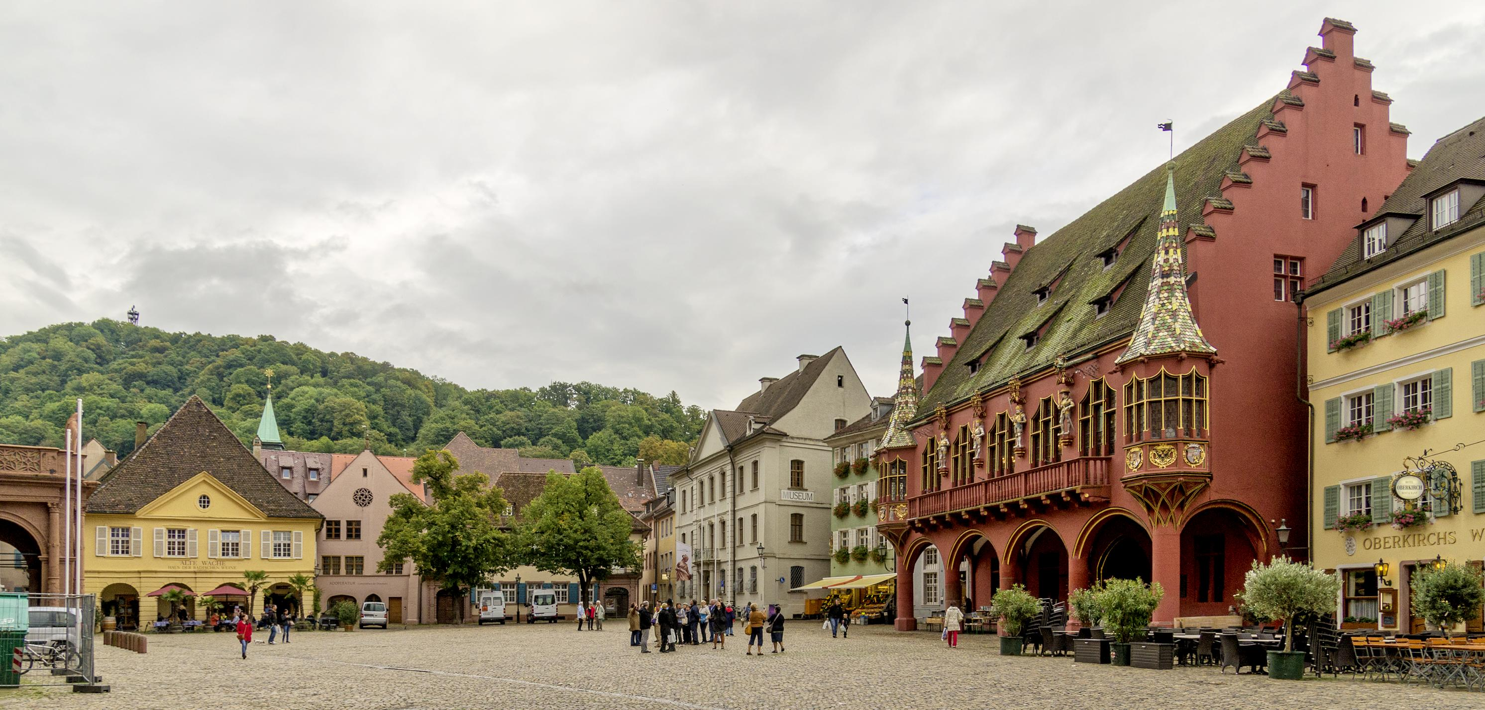 DFN Treffen am 12.09.2013 auf dem Freiburger Münsterplatz